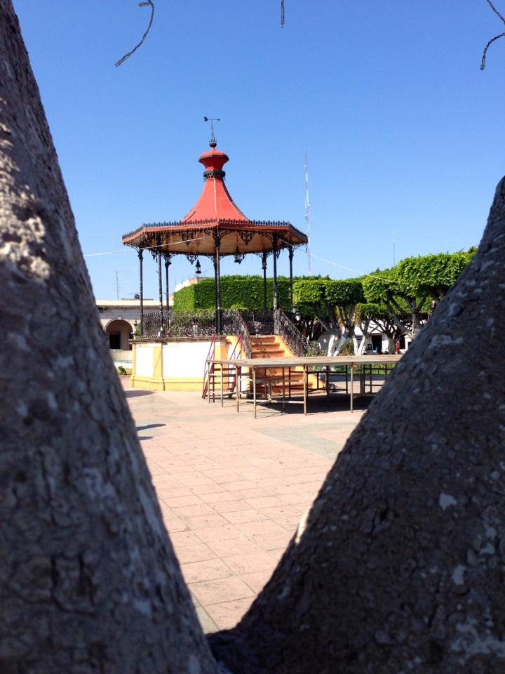 Kiosko en el Jardín Principal de Uriangato, Gto.